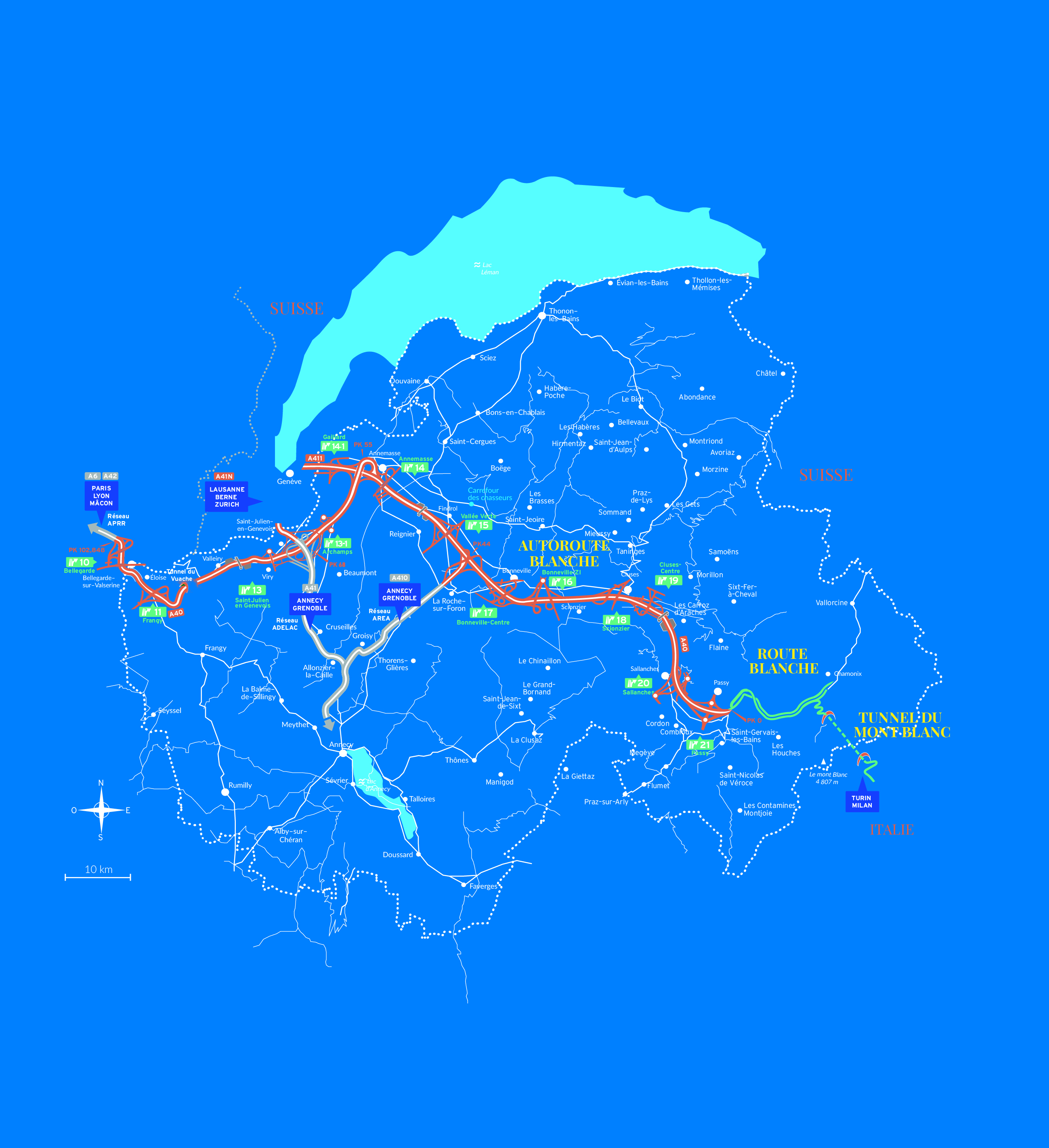 Carte du réseau d'ATMB 2017